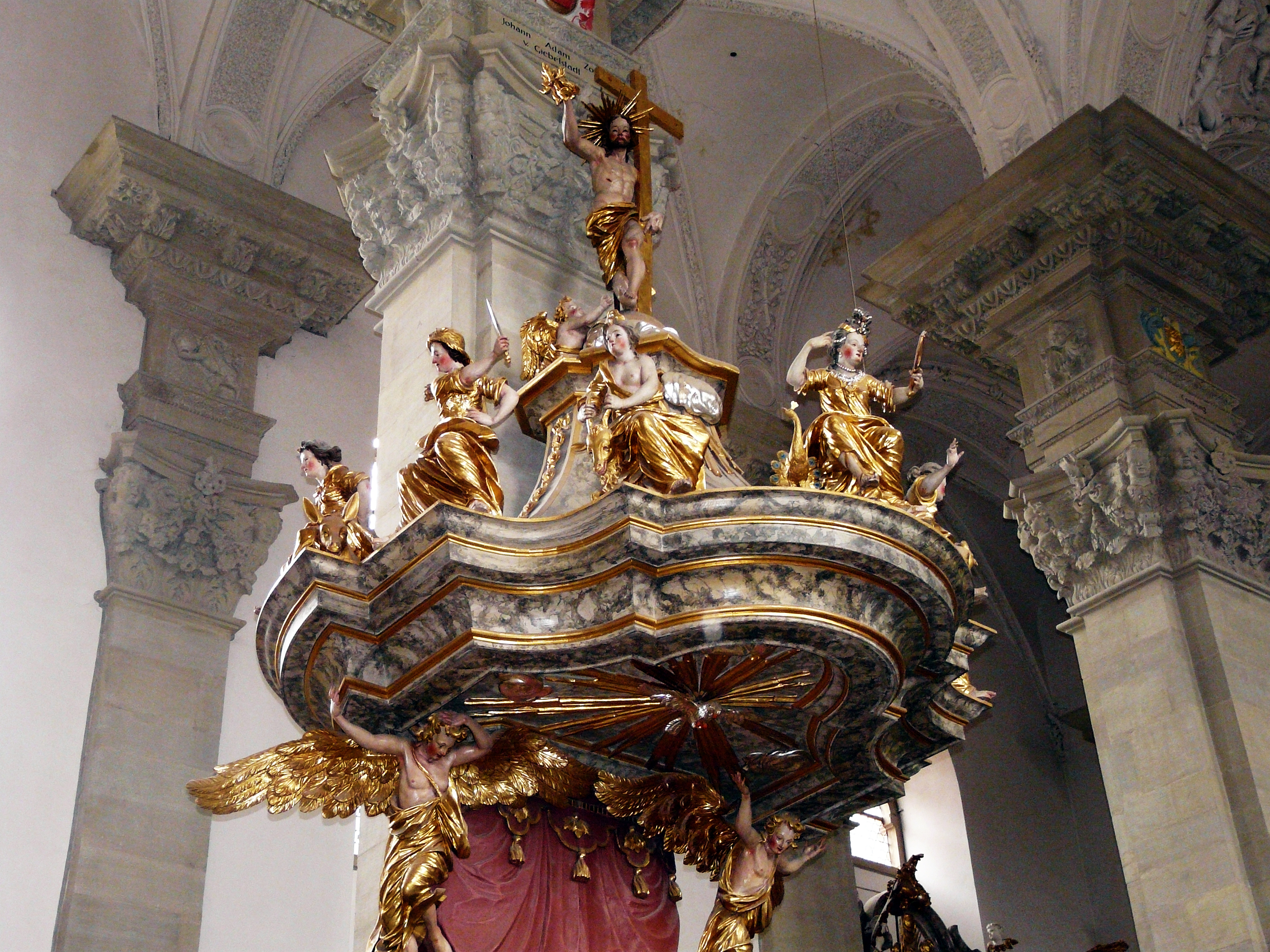 Фрагмент кафедры семи смертных грехов